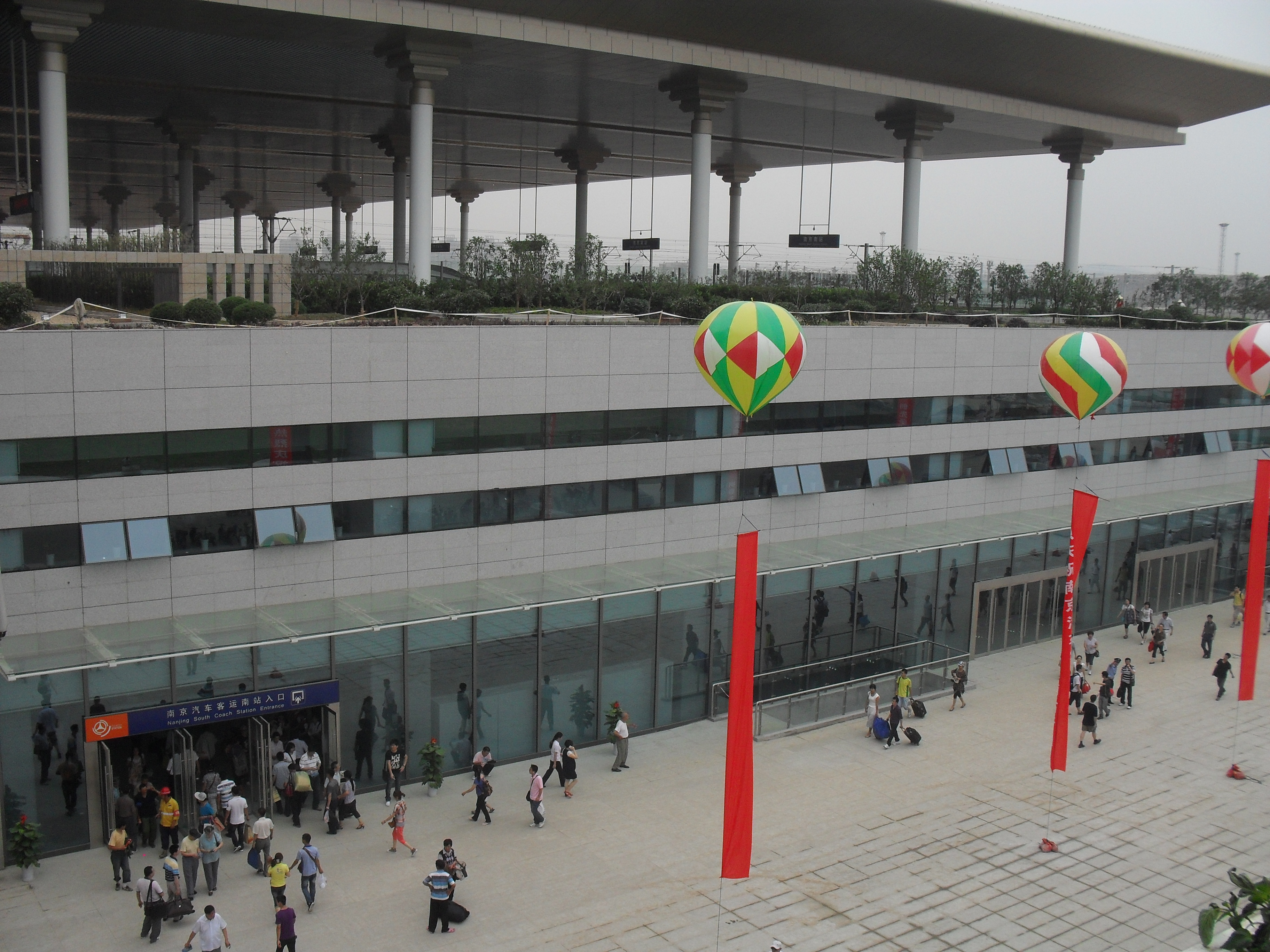 南京南站一层长途汽车站